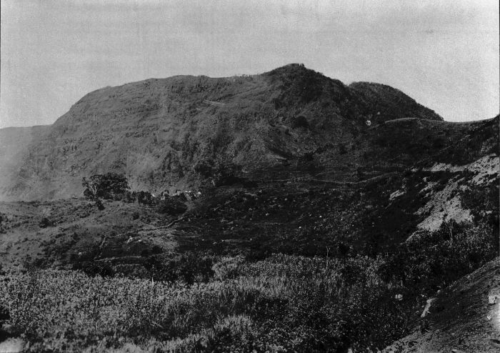 Foto. De berg Keli Nabe